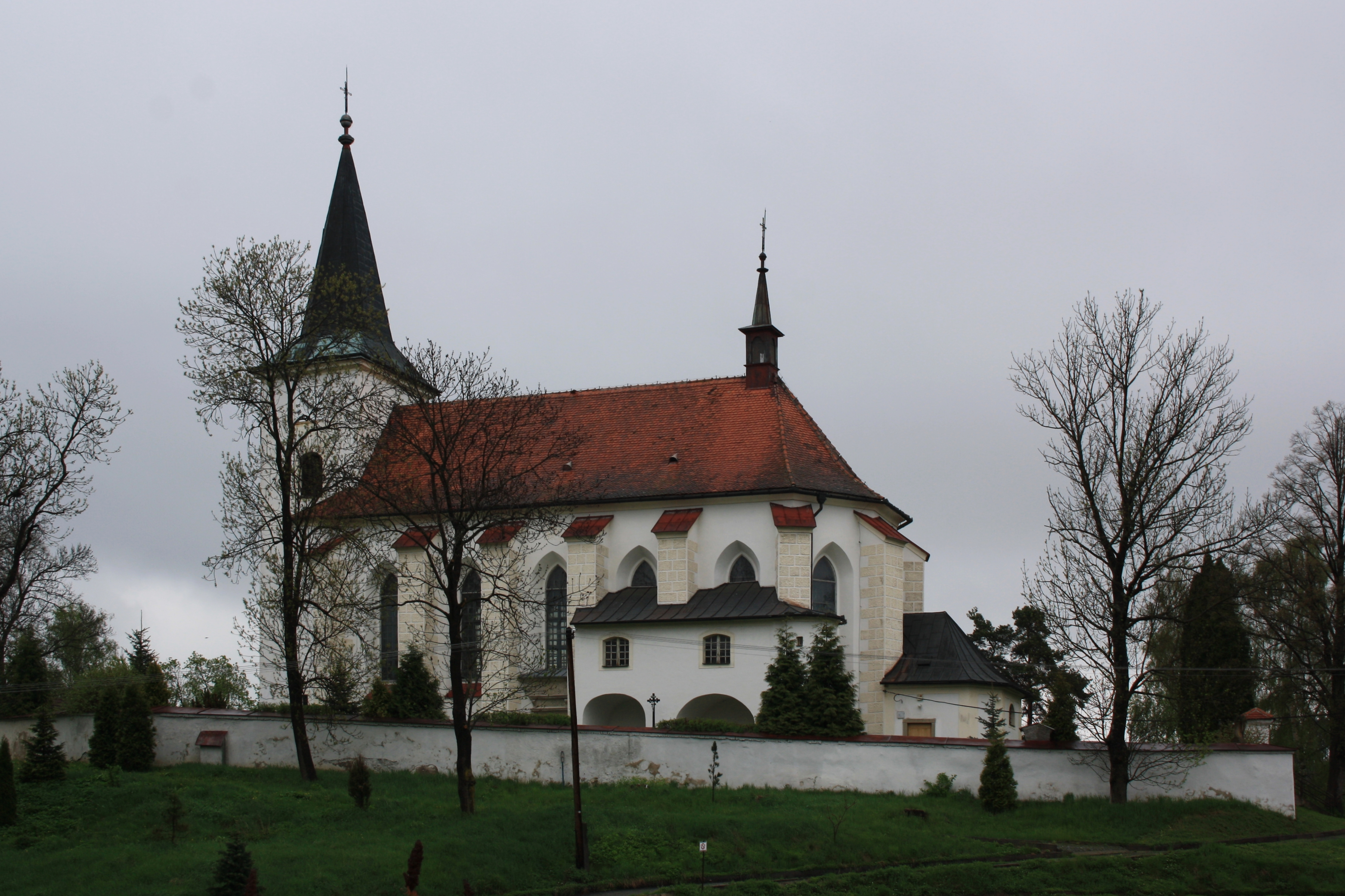 Strážek - kostel svatého Šimona a Judy This photograph was taken within the scope of the 'Czech Municipalities Photographs' grant. This photograph was taken with a DSLR from WMCZ's Camera grant.